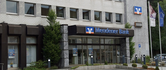 Lendringser Hauptstraße 28a, 58710 Menden